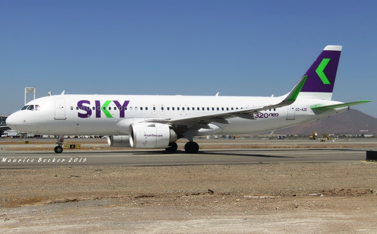 En 2018 empezaron a llegar los primeros Airbus A320neo de SKY, sus primeros aviones de fábrica.